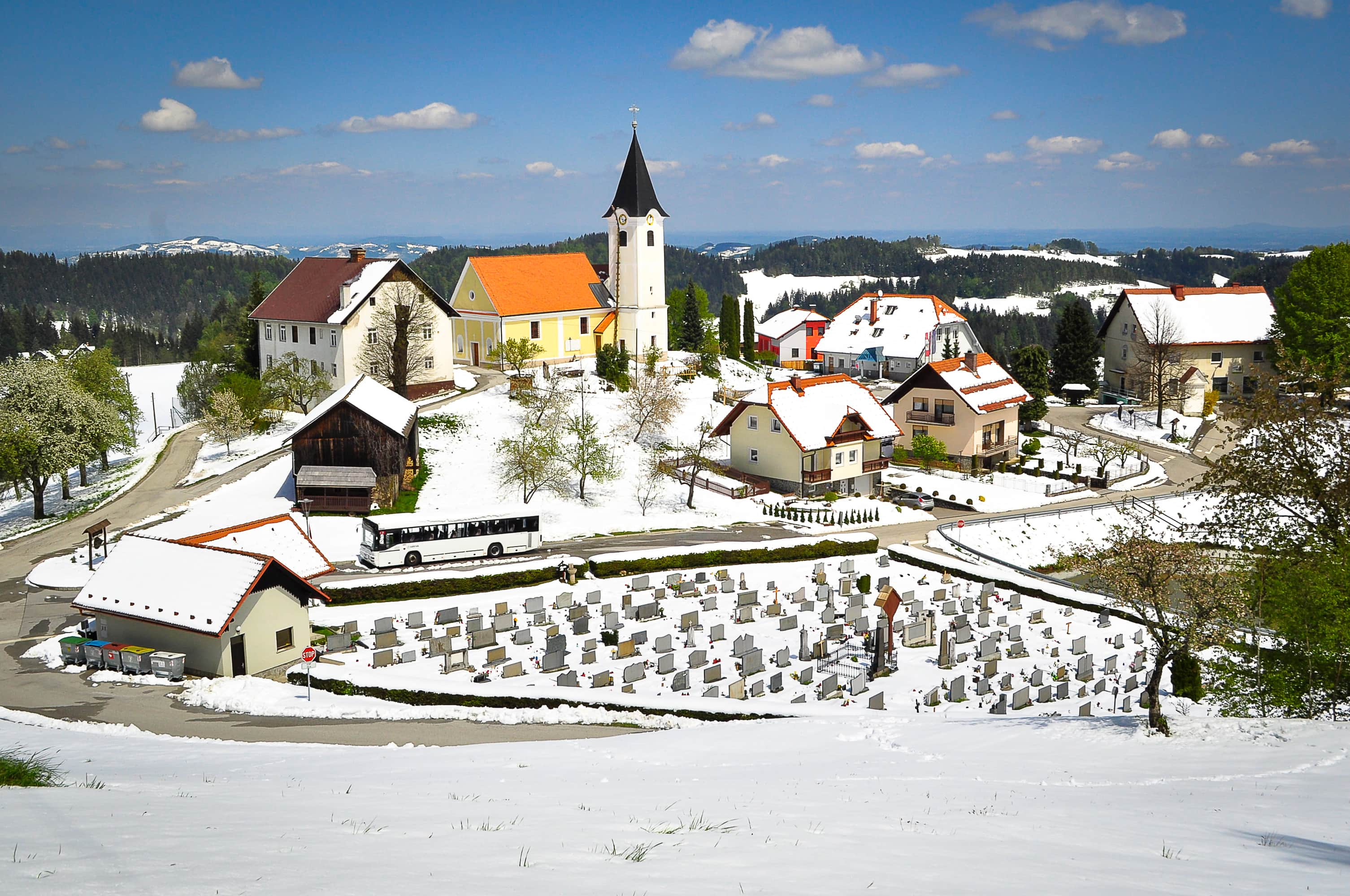 Slika kraja Kapla na Kozjaku